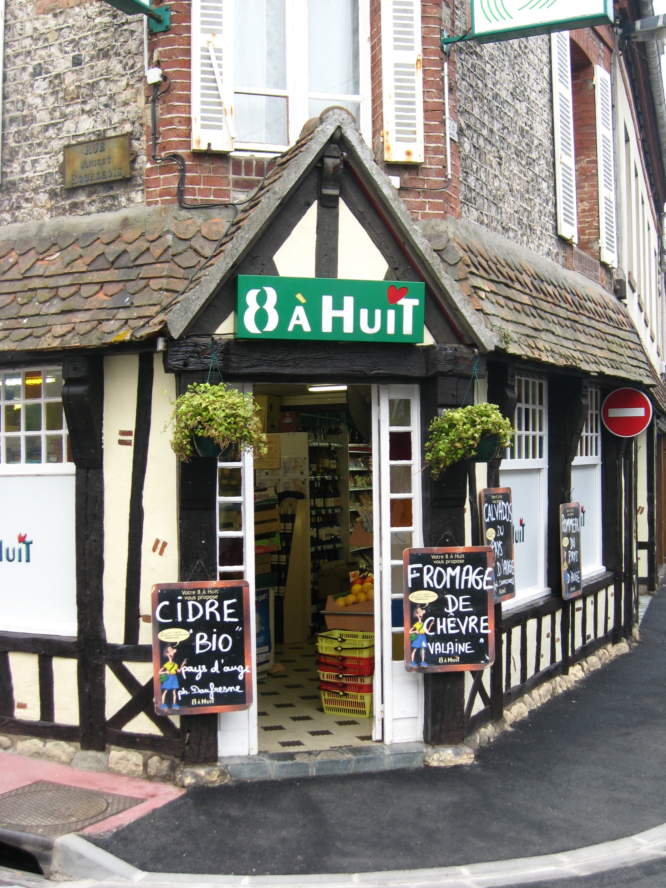 Filiale 8 À Huit in Etretat (Seine-Maritime, Frankreich.